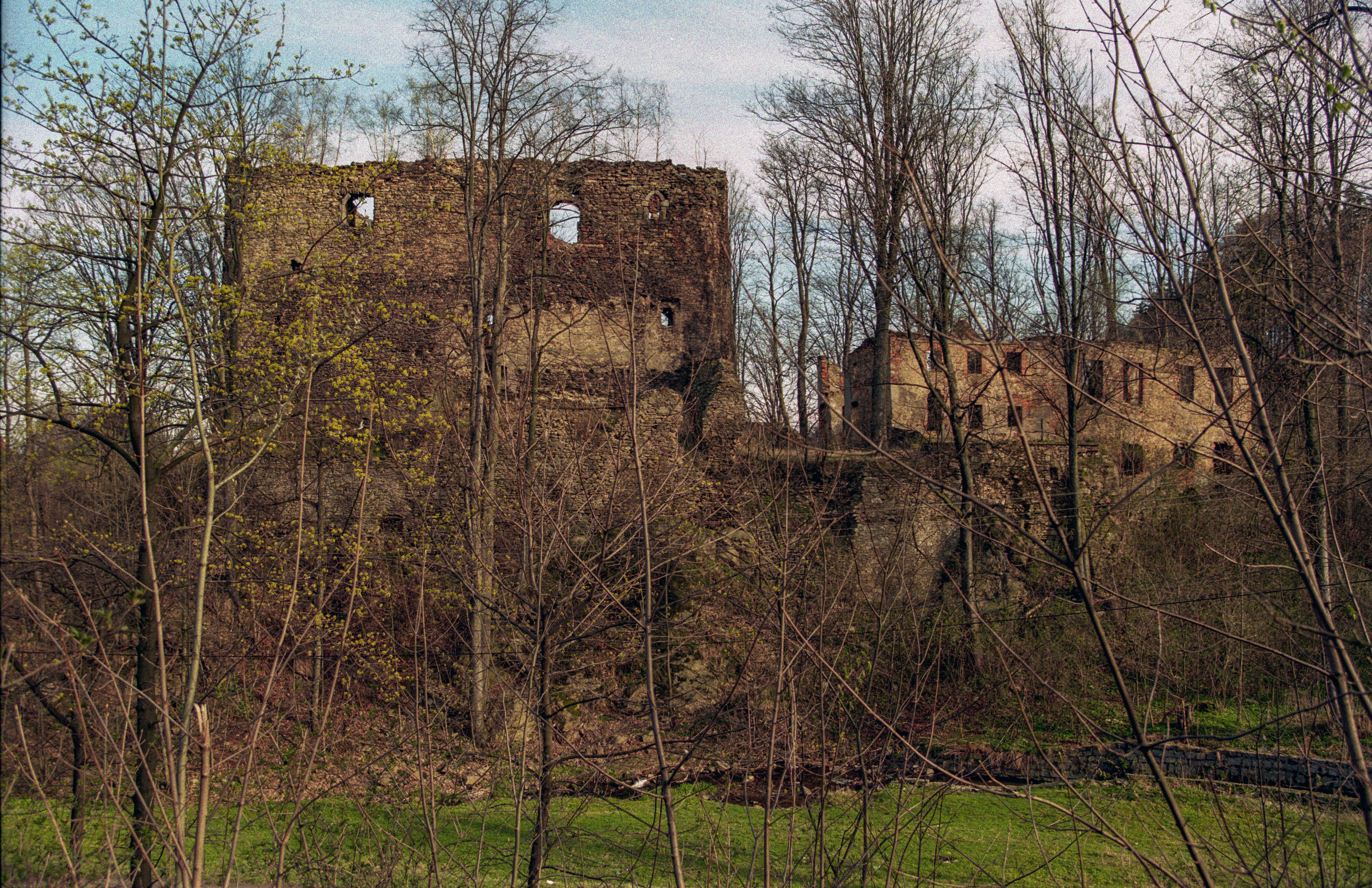 Poland, Swiecie Castle(Slask)